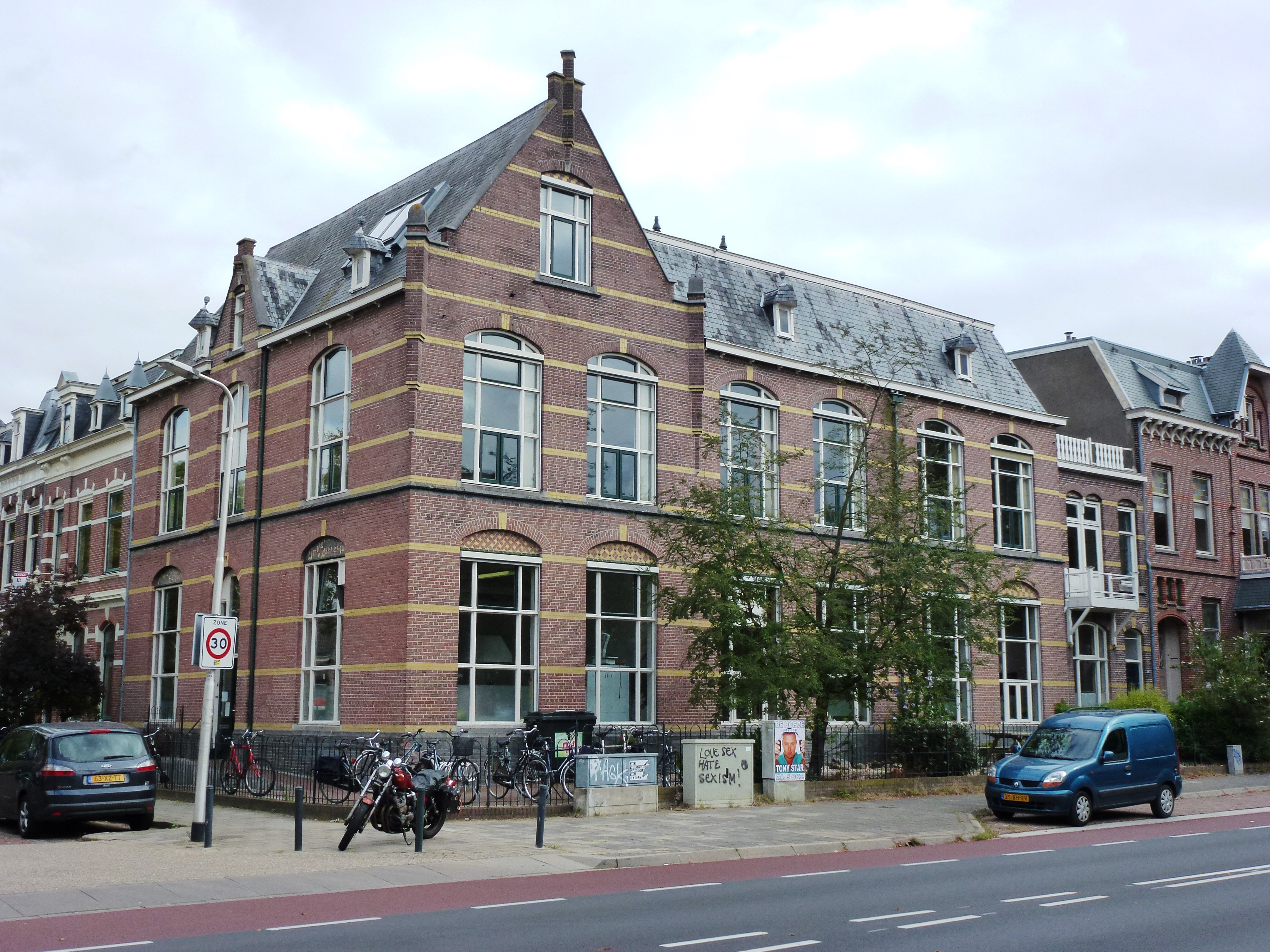 Nijmegen Kweekschool Groesbeekseweg 29